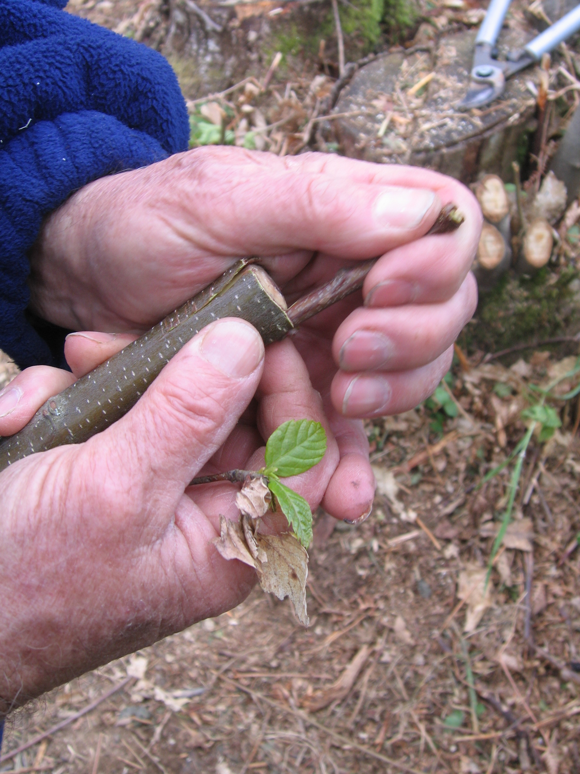 Graffe de chataignier en limousin (iniciation au conservatoire de Dournazac) - mai 2019.